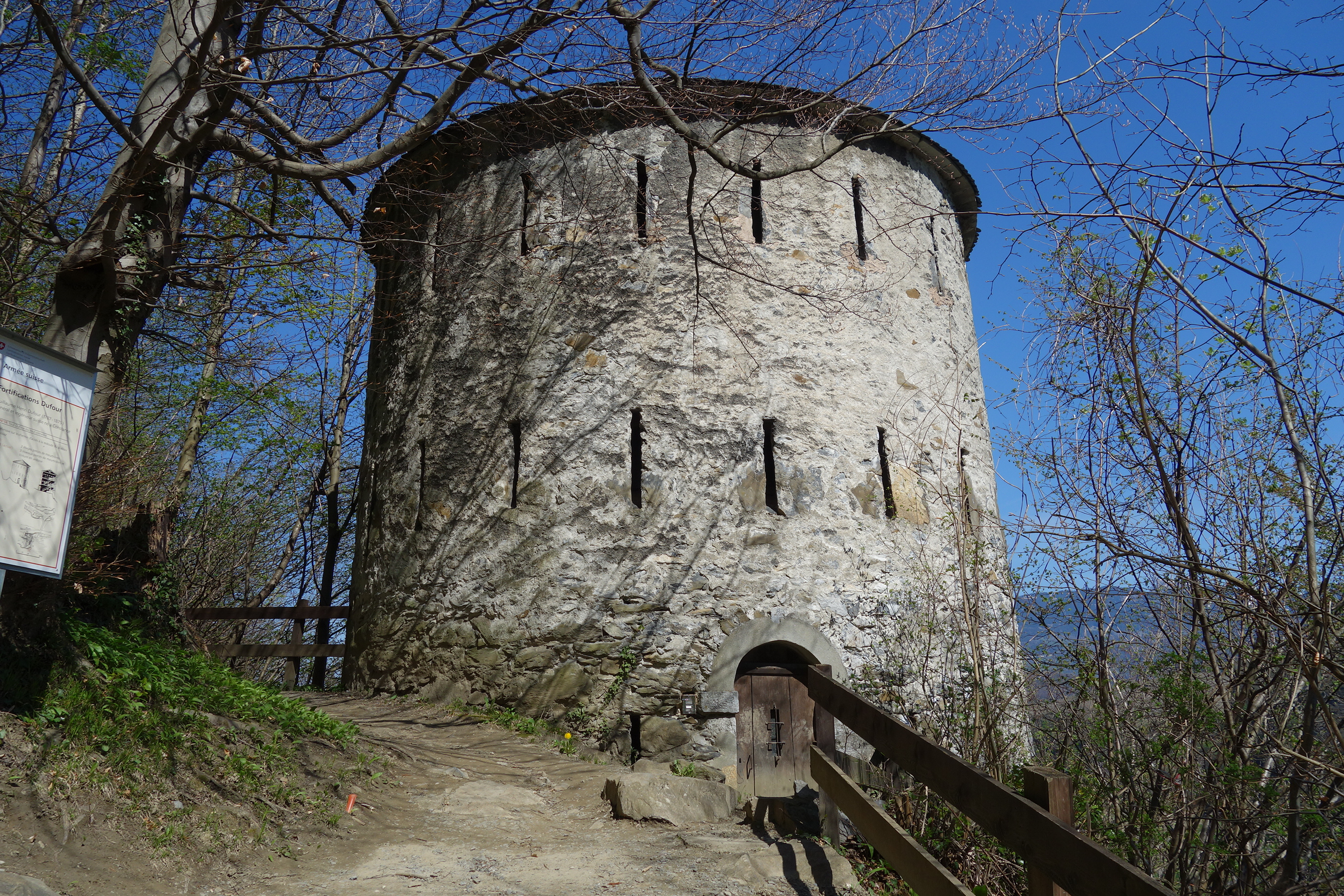 Dufourbefestigungen Saint-Maurice VS, Schweiz